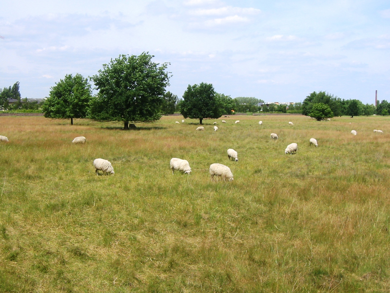 Schafherde im Landschaftspark Johannisthal/Adlershof (ehemaliges Flugfeld) in Berlin-Johannisthal, Zentralfläche NSG 35 „Ehemaliges Flugfeld Johannisthal“